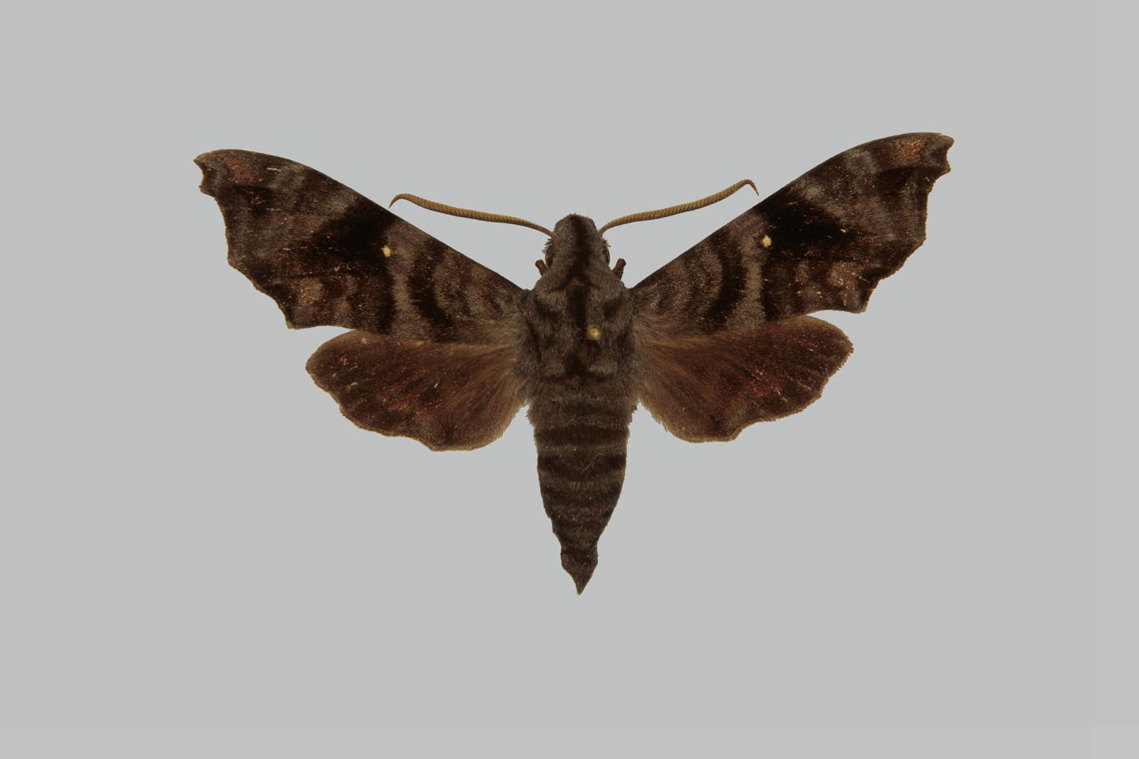 Dahira tridens, male, upperside. Nepal, Koshi Taplejung district, 3km SW Mamankhe